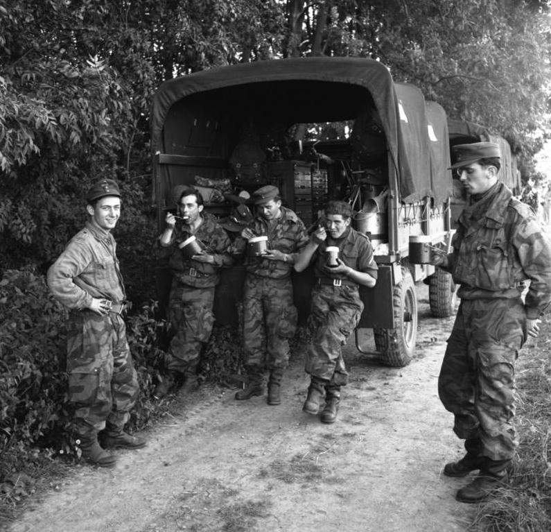 Herbstübung des Heeres: Fla-Panzer im Raum Altenkirchen-Hachenburg (Oberwesterwald)